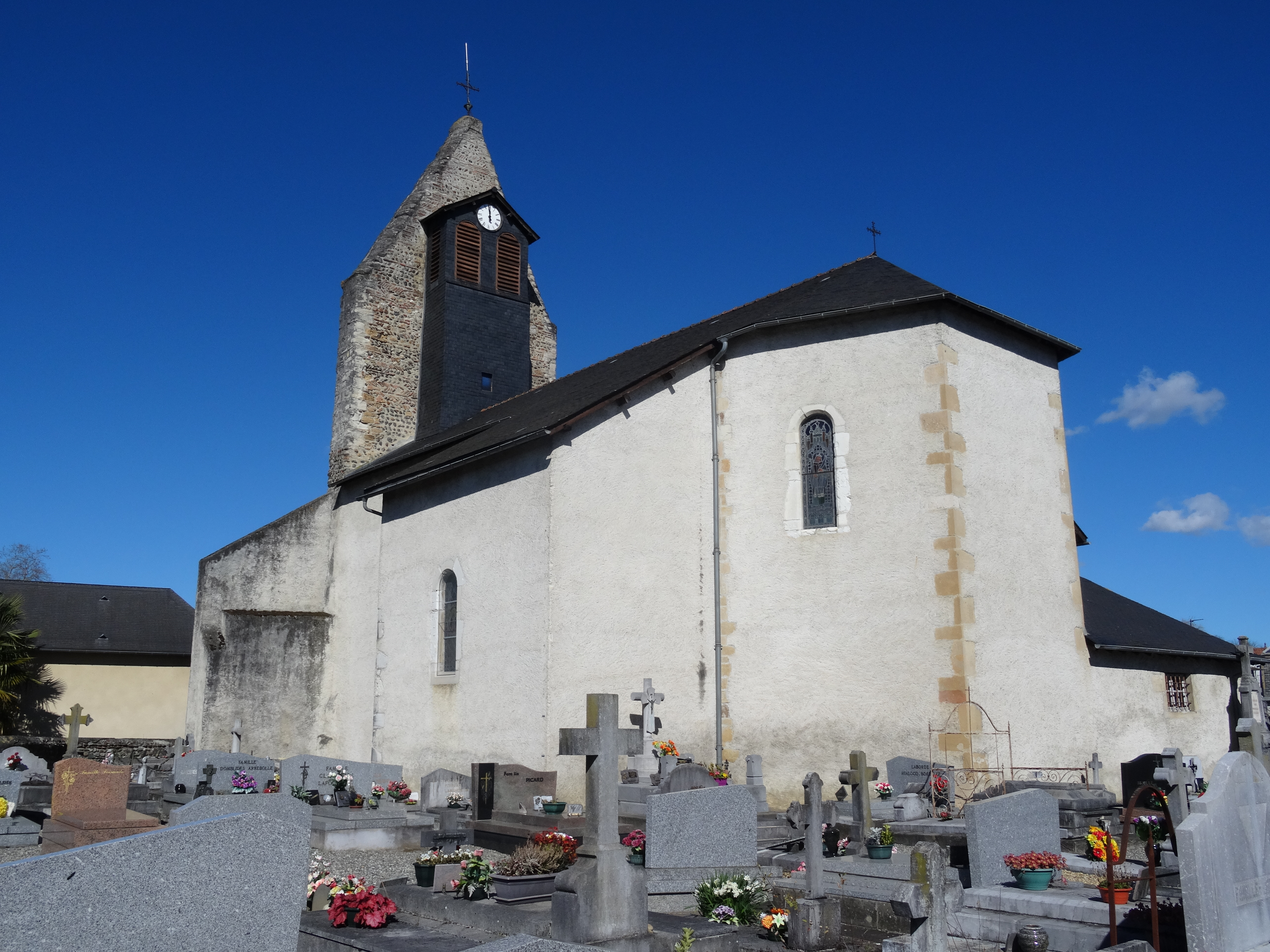 Église Saint-Julien de Lescar, depuis le cimetière